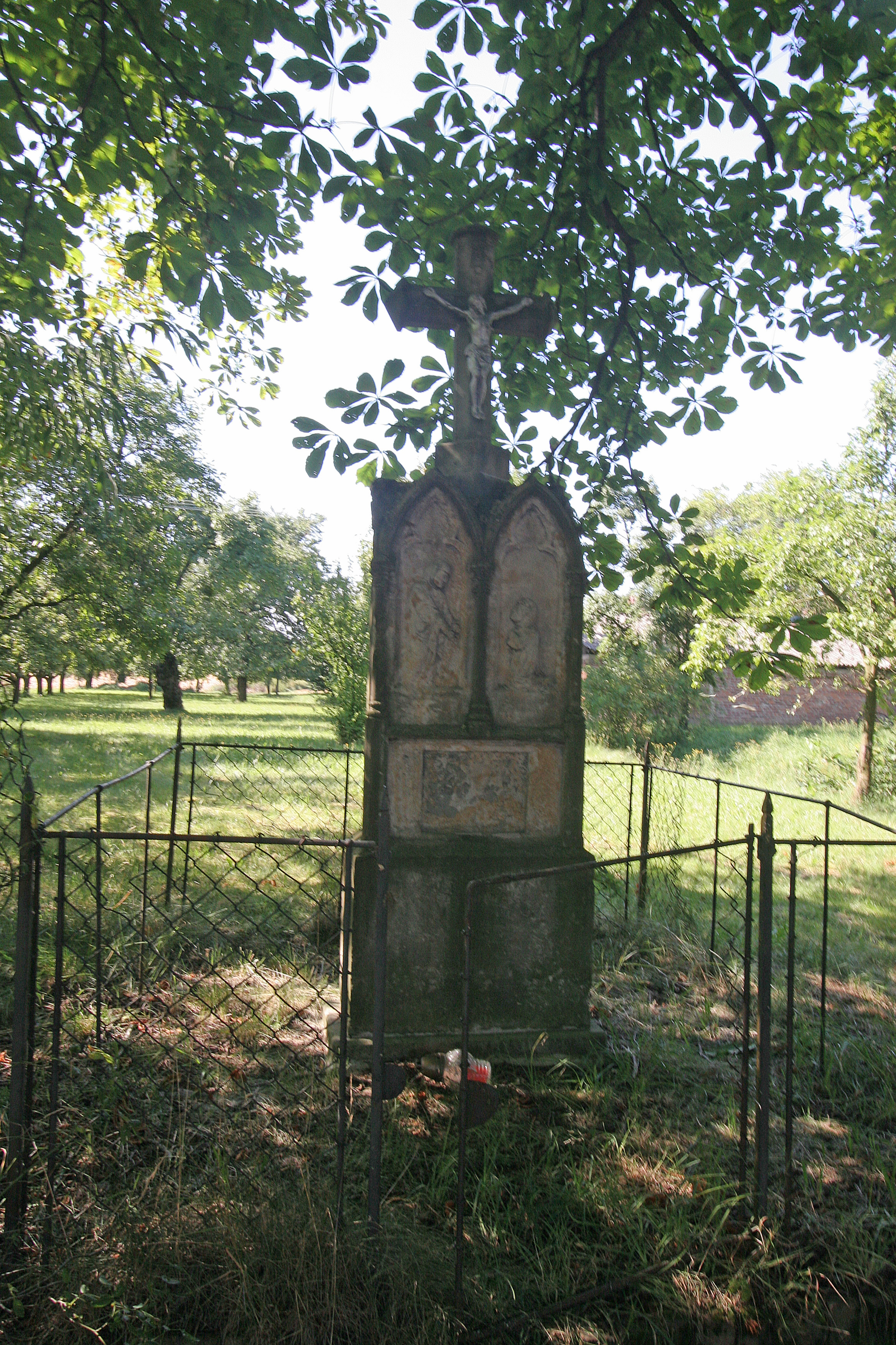 Charbuzice křížek